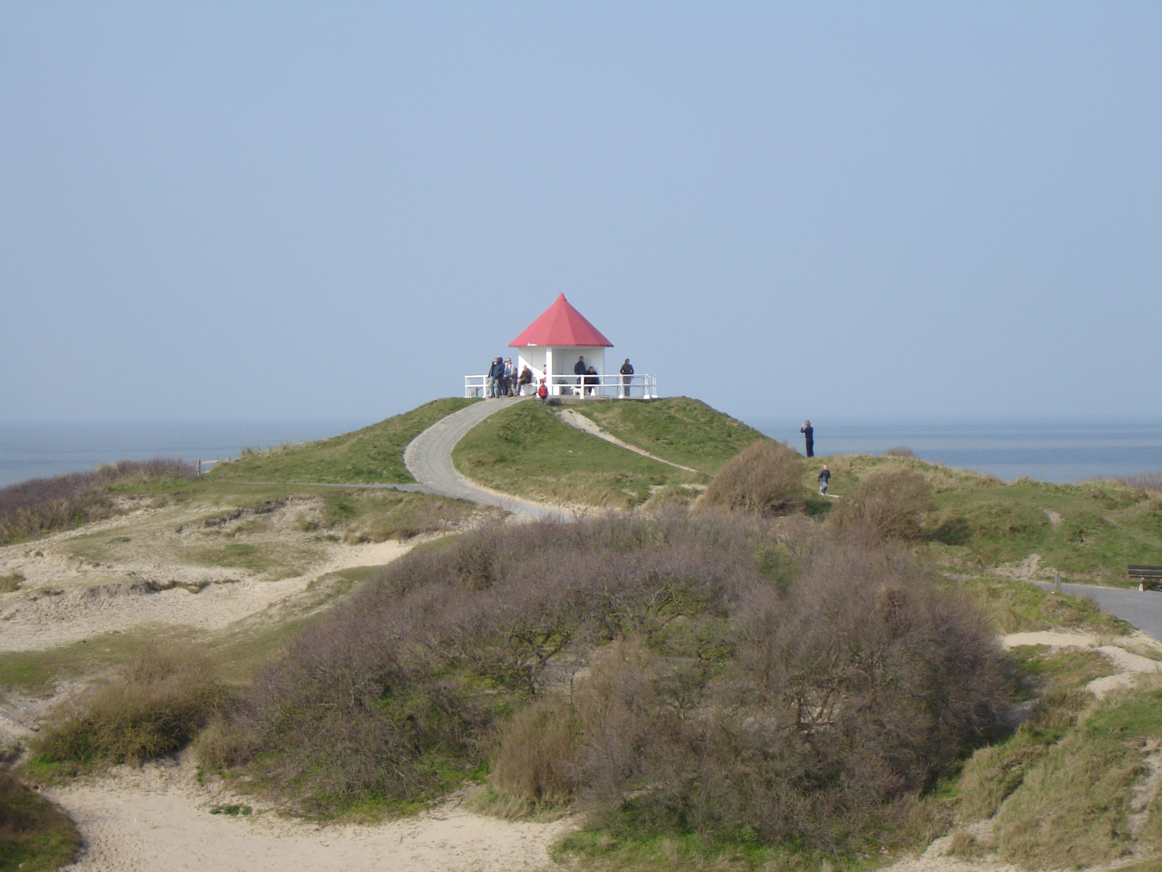 De "Spioenkop", een uitkijkpost op de op één na hoogste duin aan de Belgische kust, in WenduineDe "Spioenkop" observation post on the second highest dune on the Belgian coast, in Wenduine, De Haan, West Flanders, Belgium